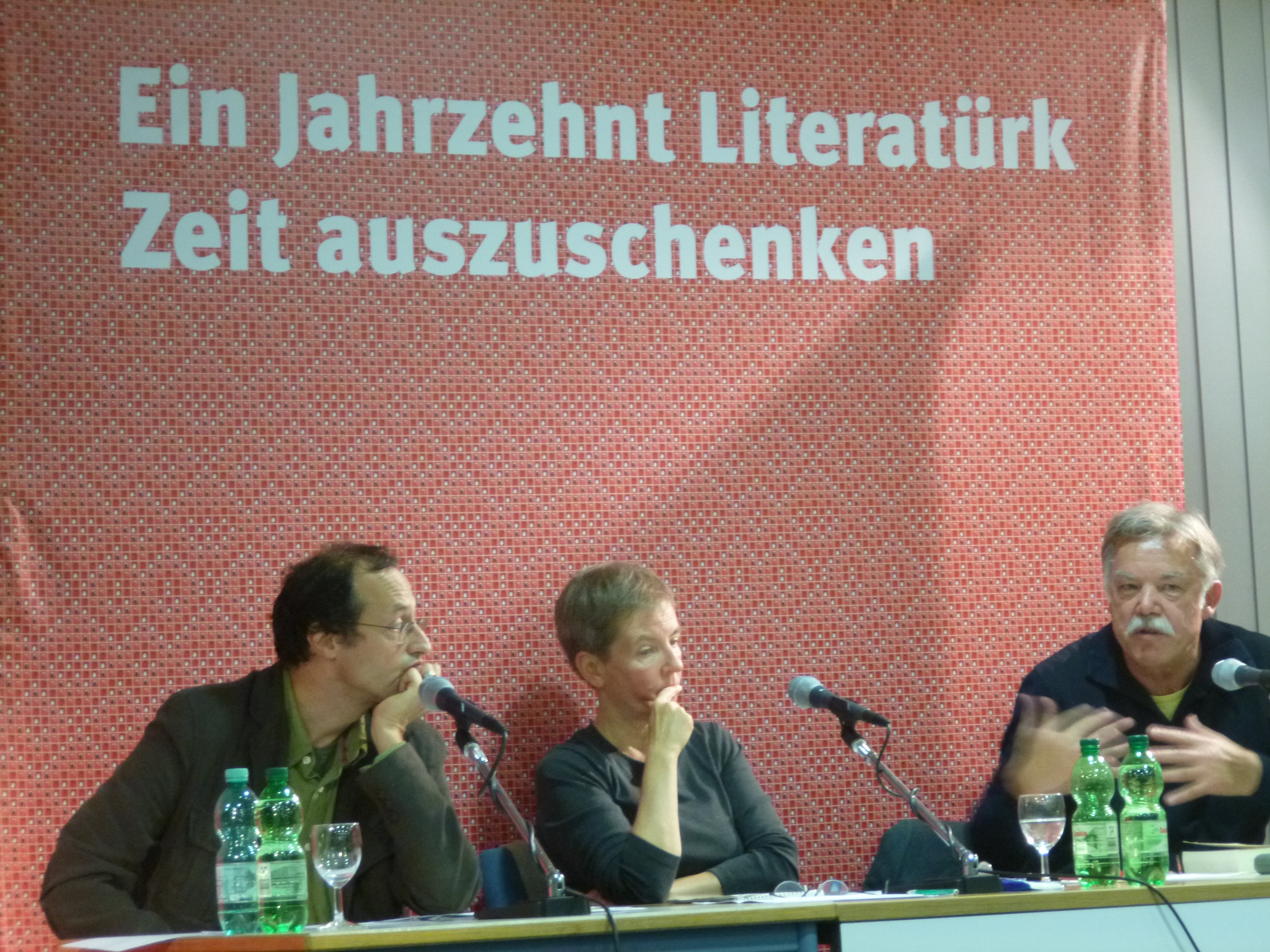 Sabine Adatepe, Tanıl Bora, Imre Török